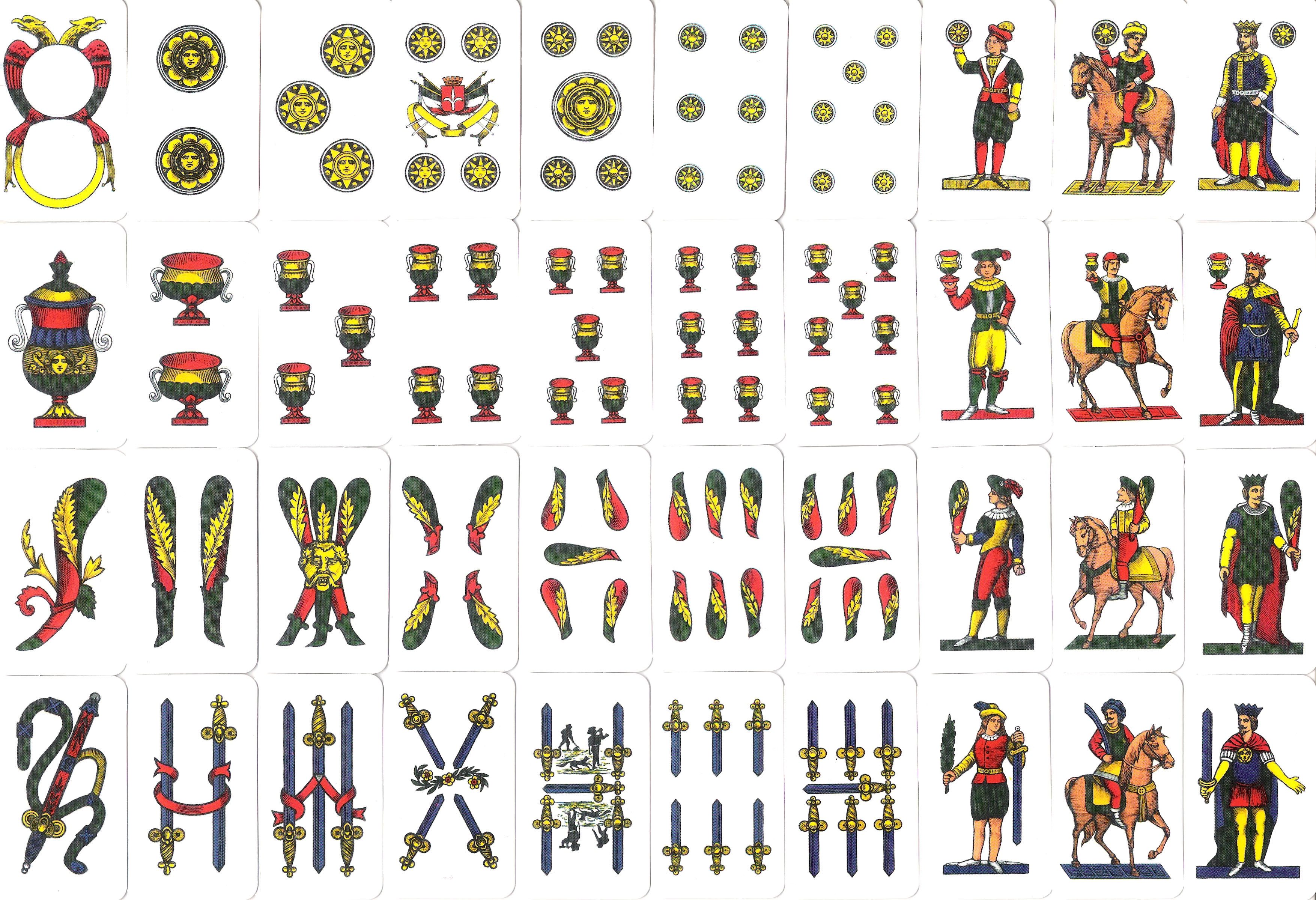 scansione di tradizionali carte napoletane